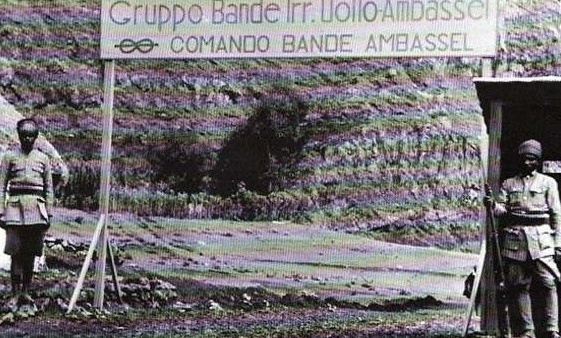 Foto digital de imagen de coloniales italianos pertenecientes a "Bande Irregolari" en el Africa Oriental Italiana. Imagen tomada de libro sobre Etiopia italiana en 1940 y modificada con mi software.